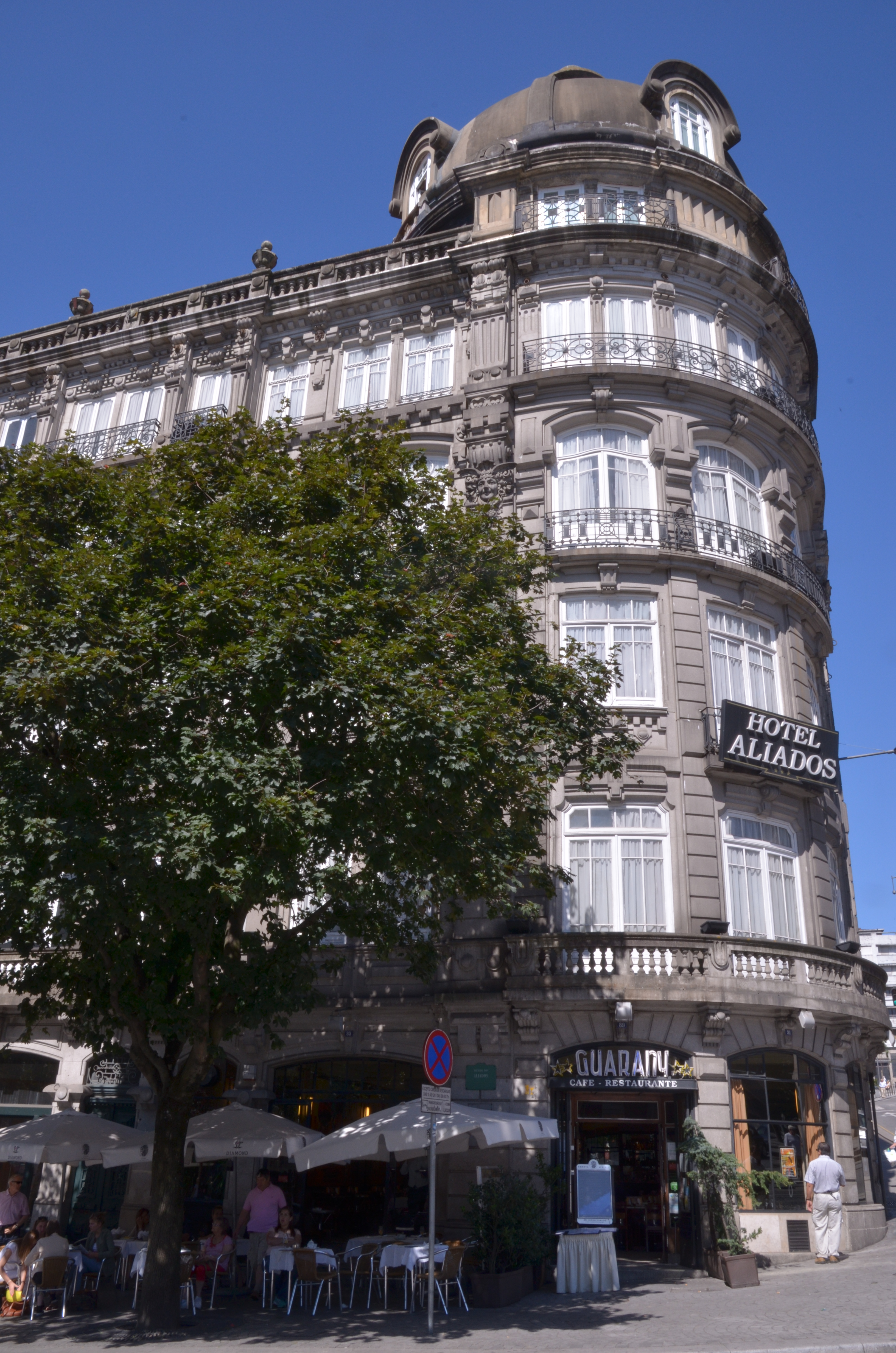 Façade du Café Guarany